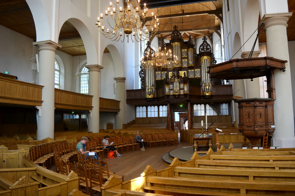 Martinytsjerke, Snits, oersjoch ynterieur